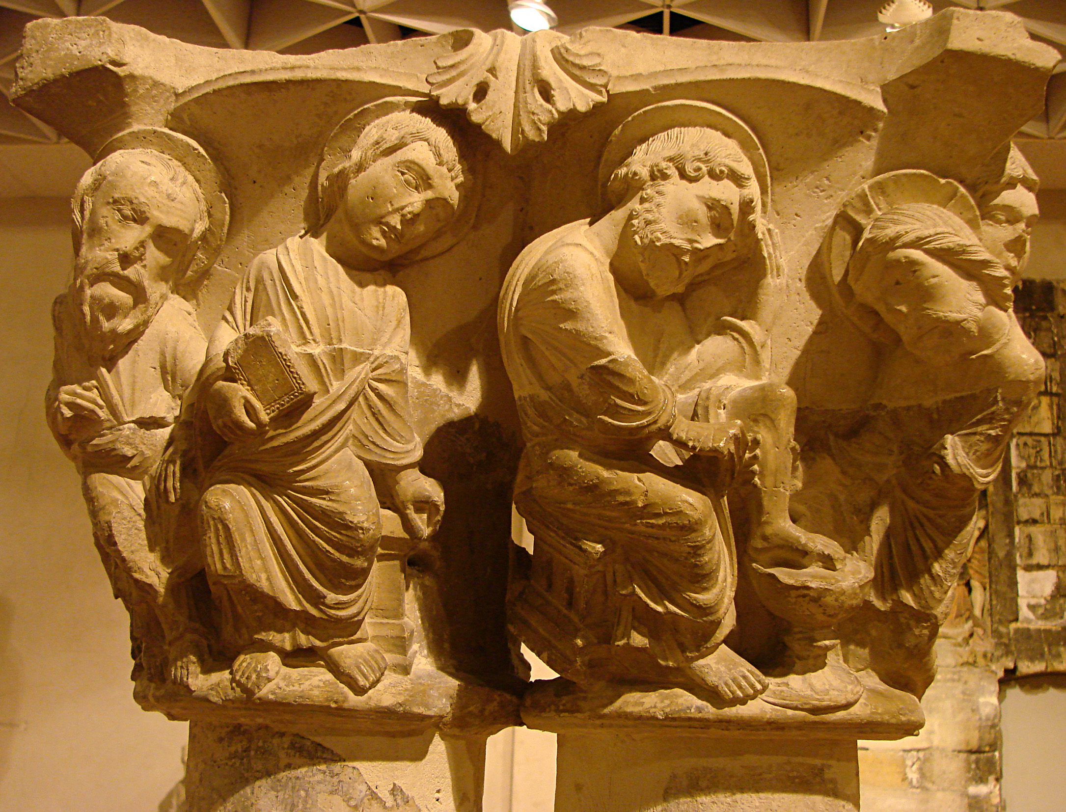 Le lavement des pieds: chapiteau du cloître de Notre-Dame-en-Vaux, 12ème siècle. Ce cloître roman, détruit au 18ème siècle, a été en partie reconstitué à partir des fragments retrouvés. Musée du cloître de Notre-Dame-en-Vaux, Châlons en Champagne (51), France.